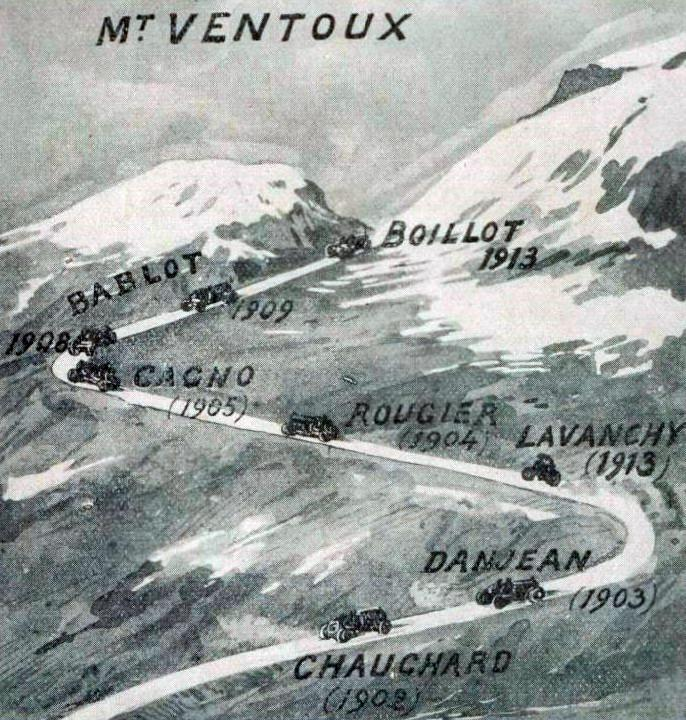 Vainqueurs de la côte du Ventoux avant 1914, positions théoriques superposées sur les deux derniers lacets.